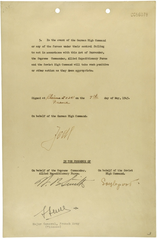 כתב הכניעה של גרמניה בריימס (2)